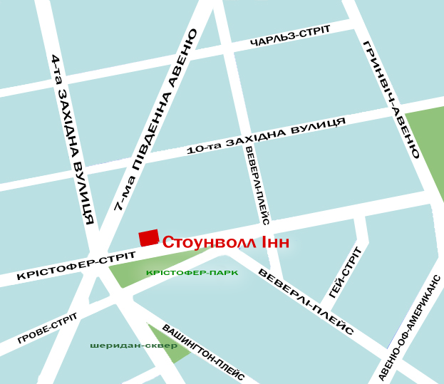 Стоунволл Інн на карті Грінвич-Віллидж